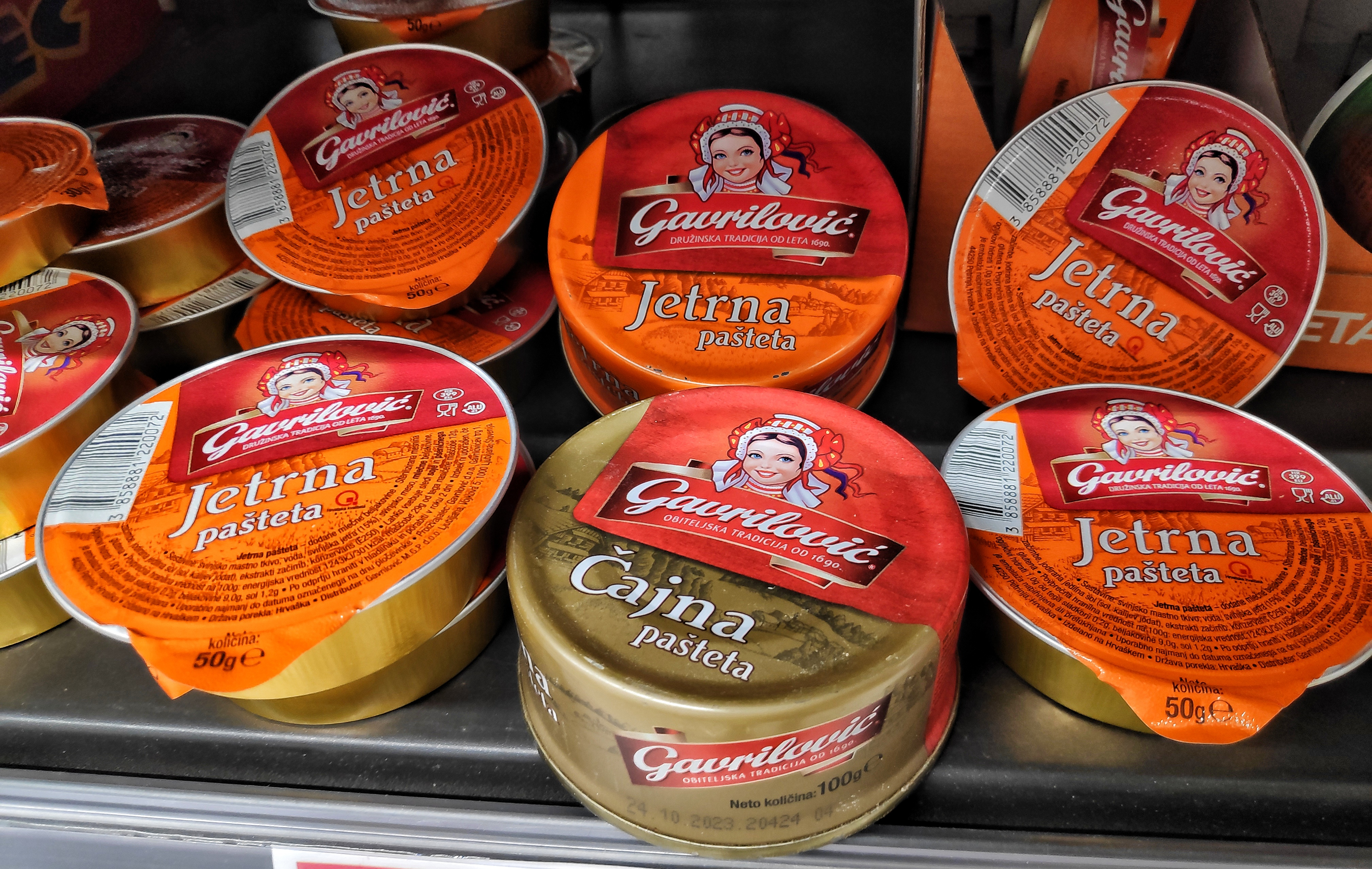 Gavrilović paštete u Sloveniji (2019)